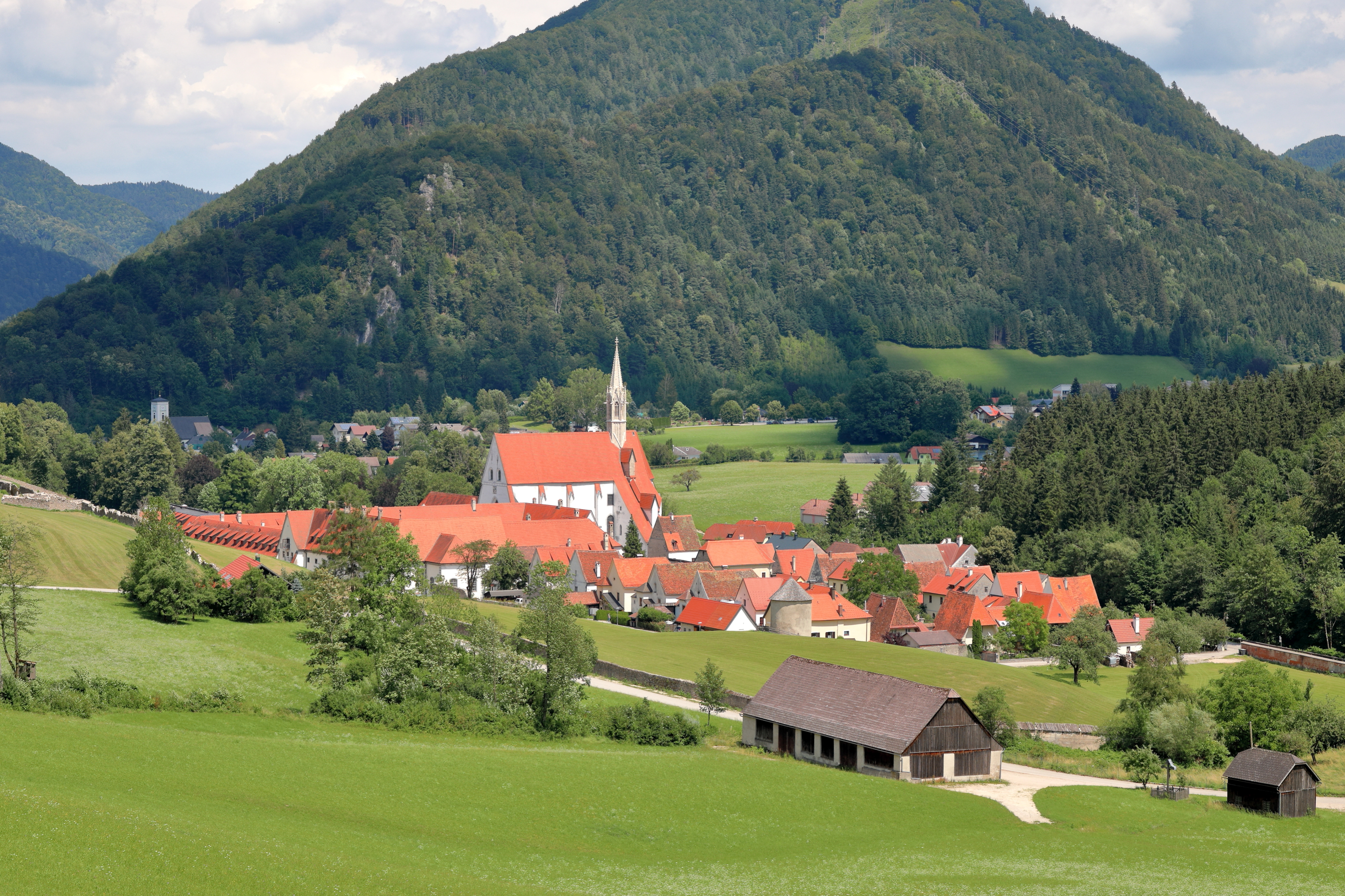 Südwestansicht des ehemaligen Kartäuserklosters Marienthron in der niederösterreichischen Marktgemeinde Gaming. Die größte Kartause der deutschen Ordensprovinz wurde ab 1332 errichtet und 1782 unter Kaiser Joseph II. aufgelöst.